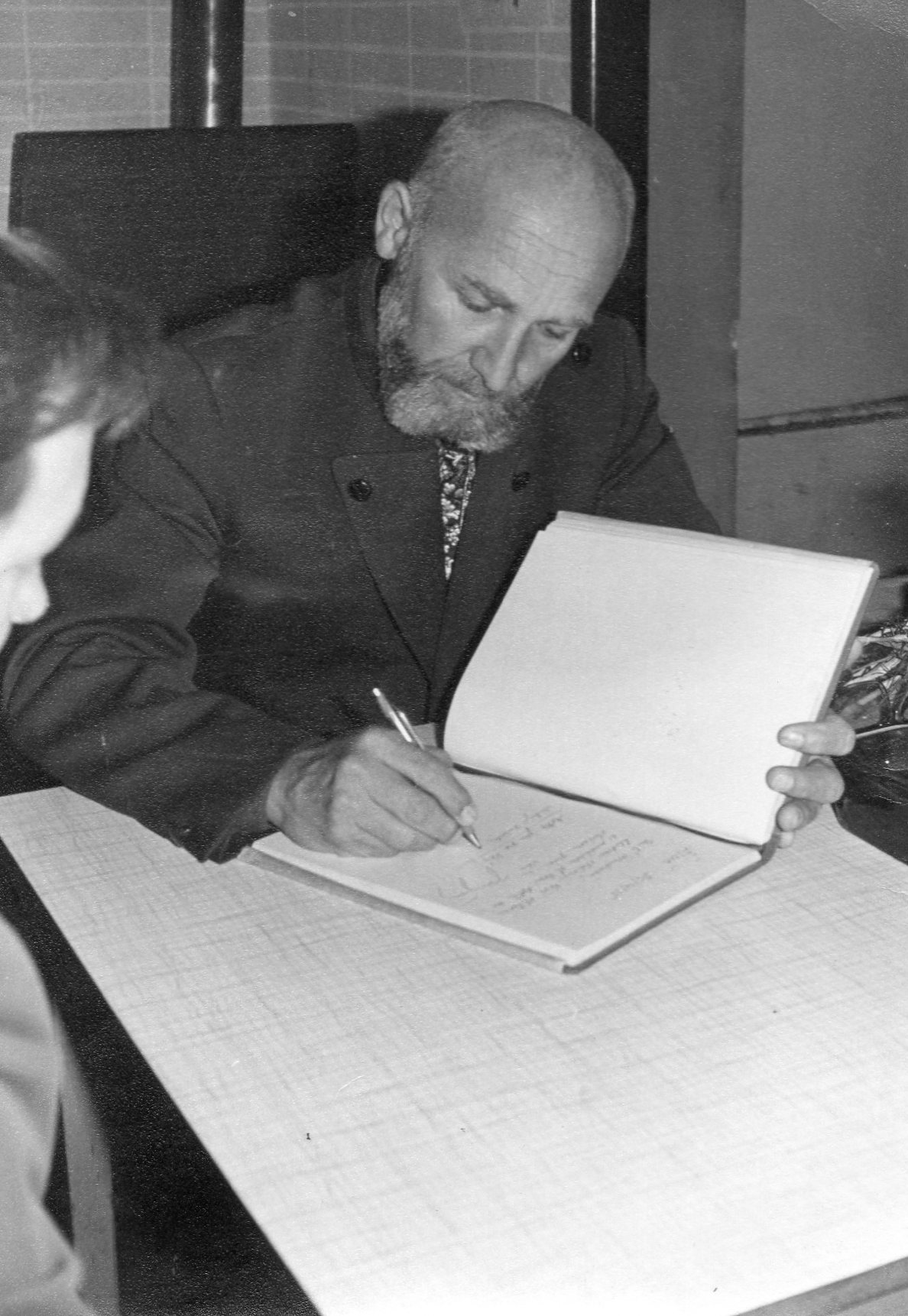 Podepisující se Josef Vágner